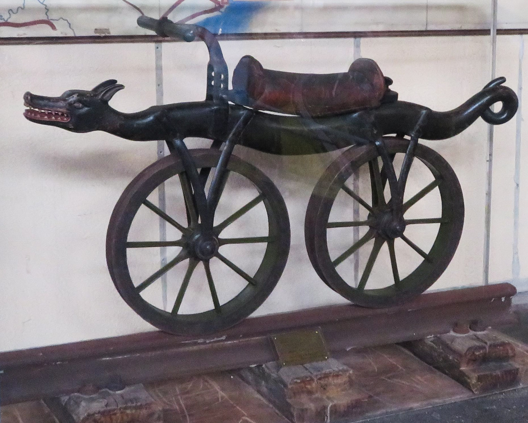 Mulhouse, Eisenbahnmuseum 2016